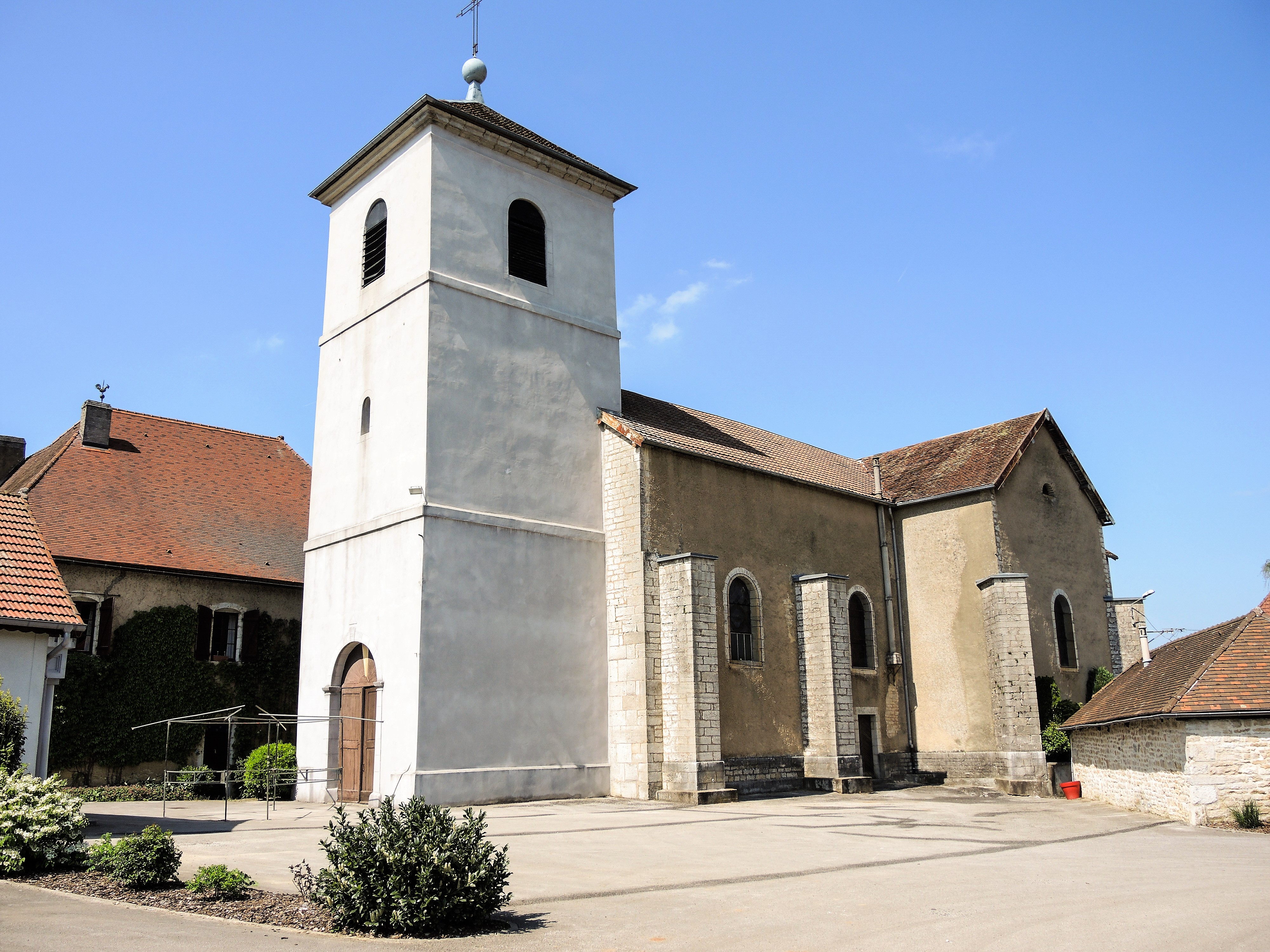 Eglise Saint-Jean-Baptiste de Saint-Juan. Doubs